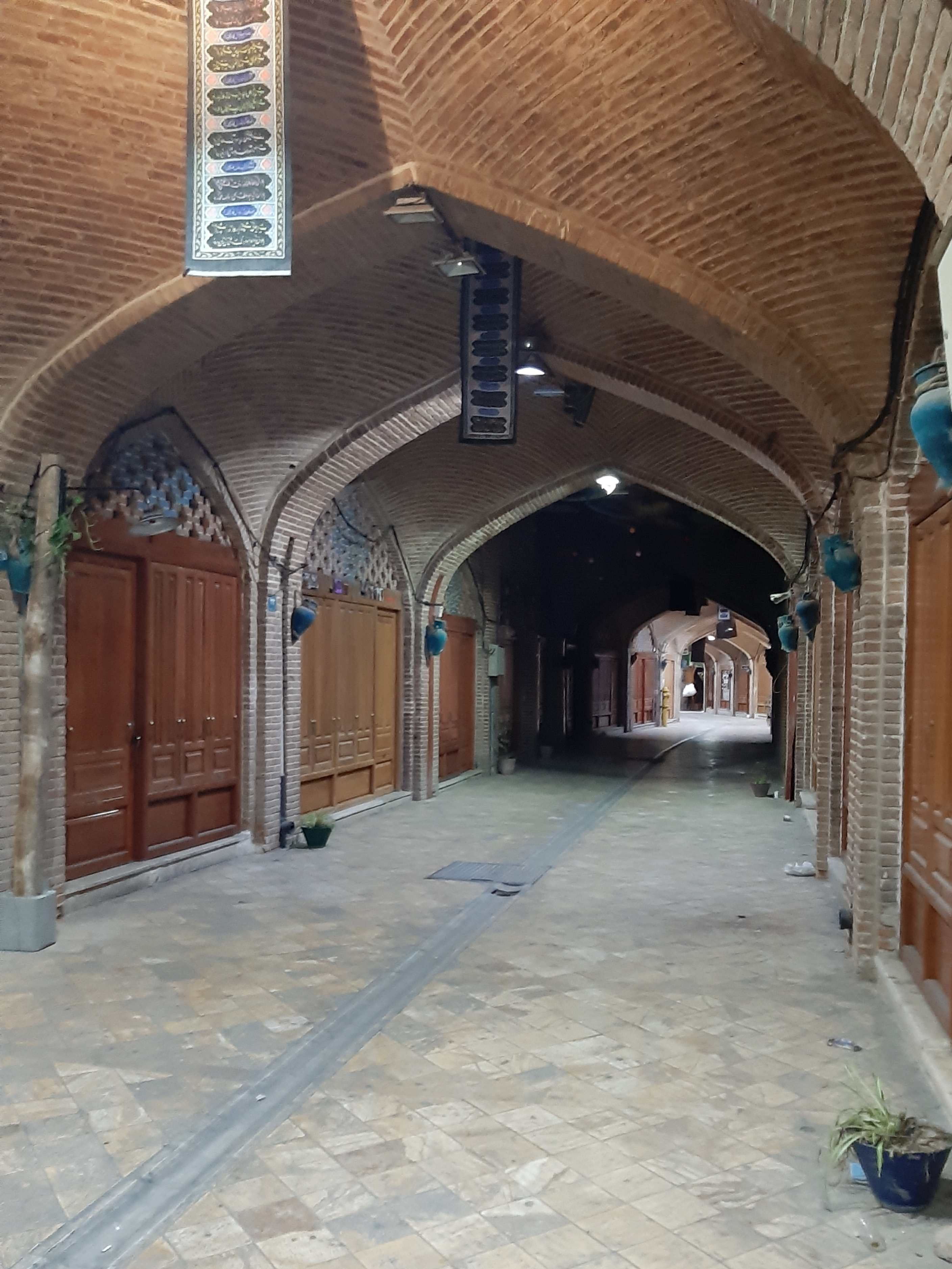 عودلاجان